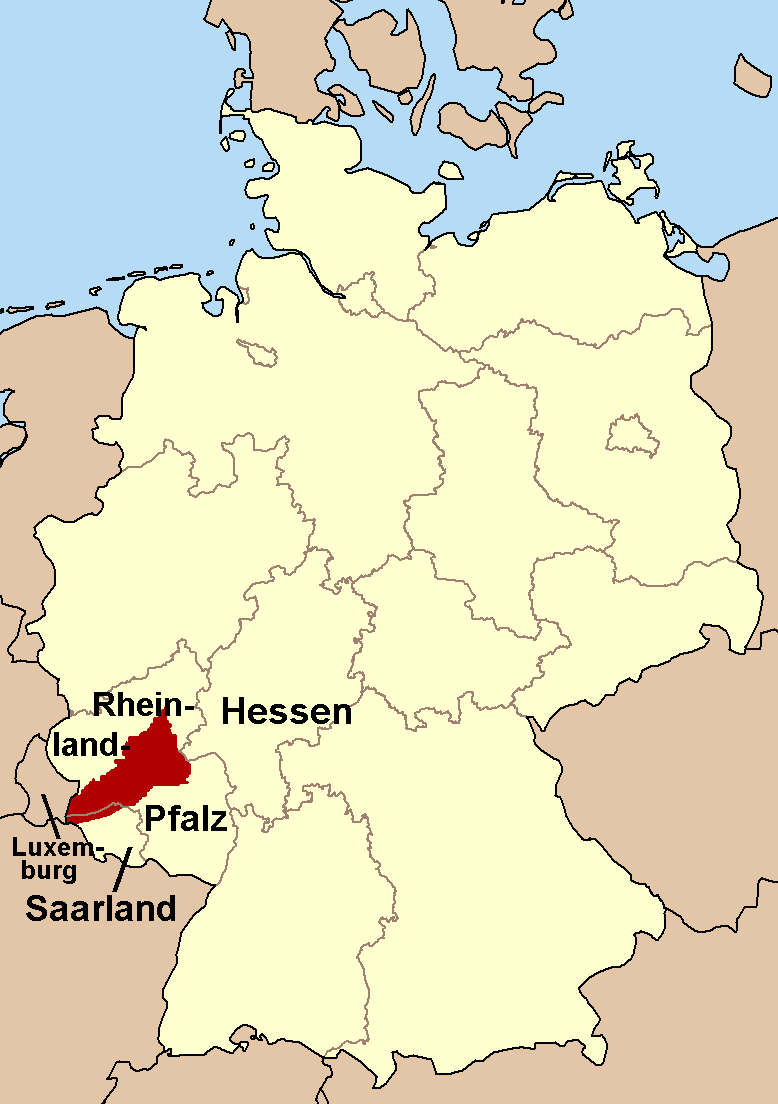 Beschreibung: Lagekarte des Hunsrücks Quelle: Karte von bearbeitet Fotograf oder Zeichner: User:Ahoerstemeier, roßbacher 2004 Andere Versionen: - - Lizenzstatus: GNU FDL